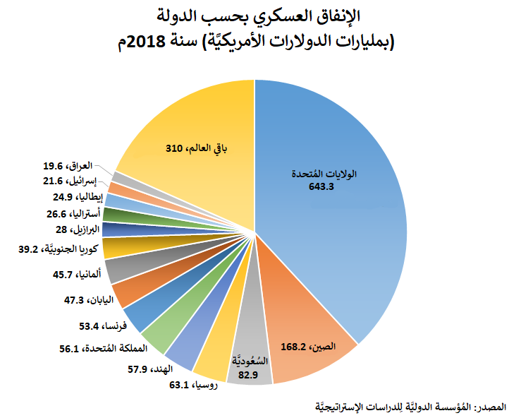 رسمٌ بياني دائري يوضح نسب الإنفاق العسكري العالمي لِسنة 2018م، بِمليارات الدولارات الأمريكيَّة.